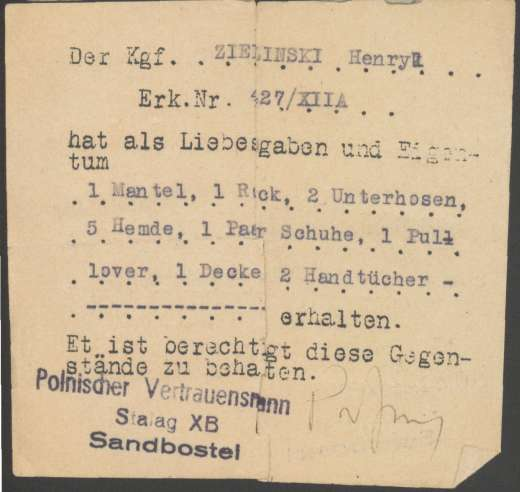 Wyposażenie jeńca - pokwitowanie wydania "majątku ruchomego" Z archiwum domowego Henryka Zielińskiego, skan wykonałem osobiście --Julo 07:42, 30 sty 2005 (CET)